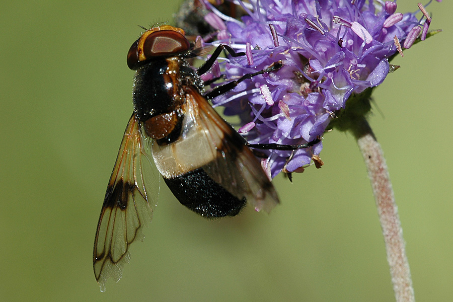 Volucella pellucens, Klosterheden, Denmark